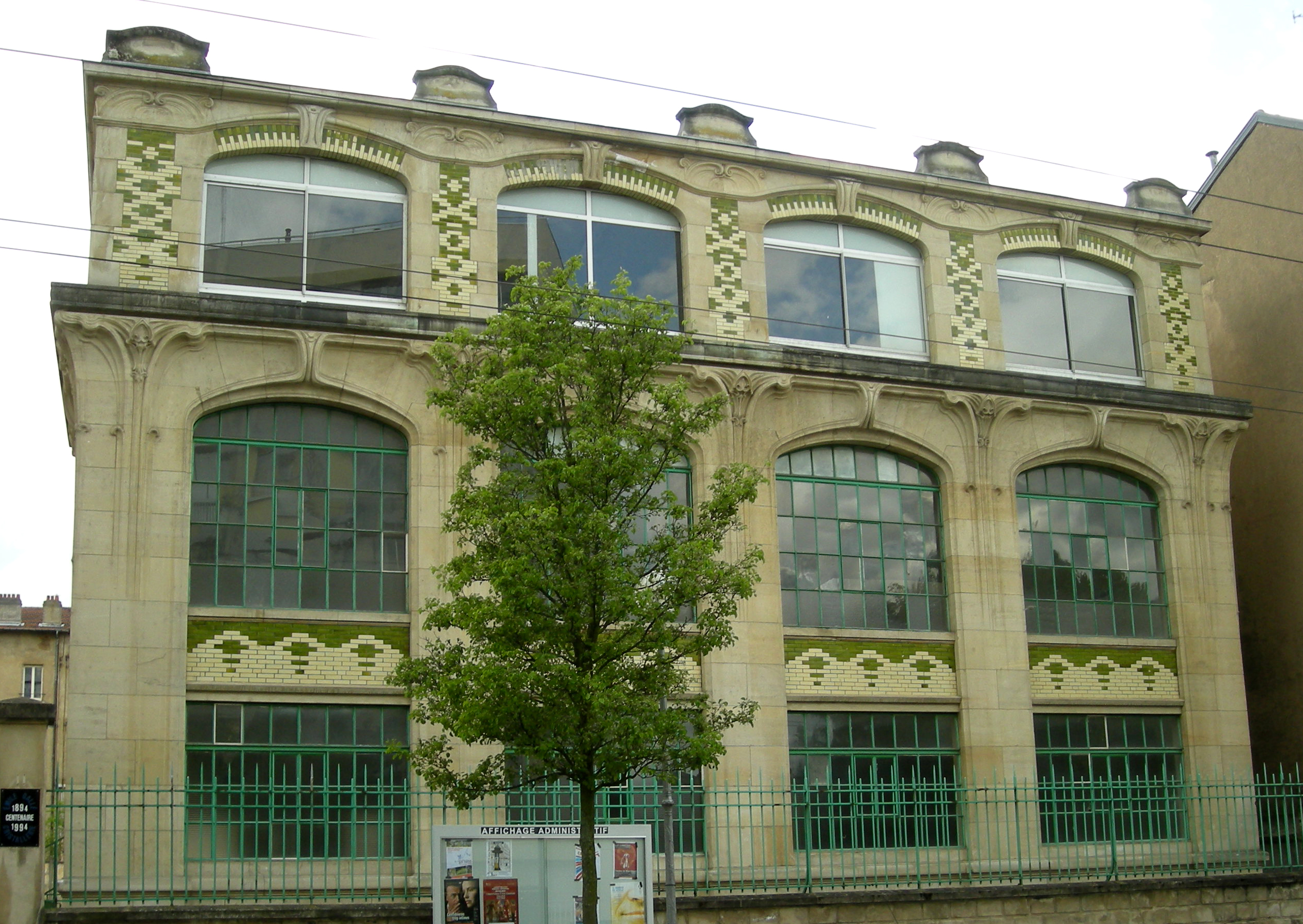 La cristallerie créée par Emile Gallé en 1894 à Nancy (devenue par la suite et jusqu'à la fin du XXe siècle l'École spéciale de radioélectricité).